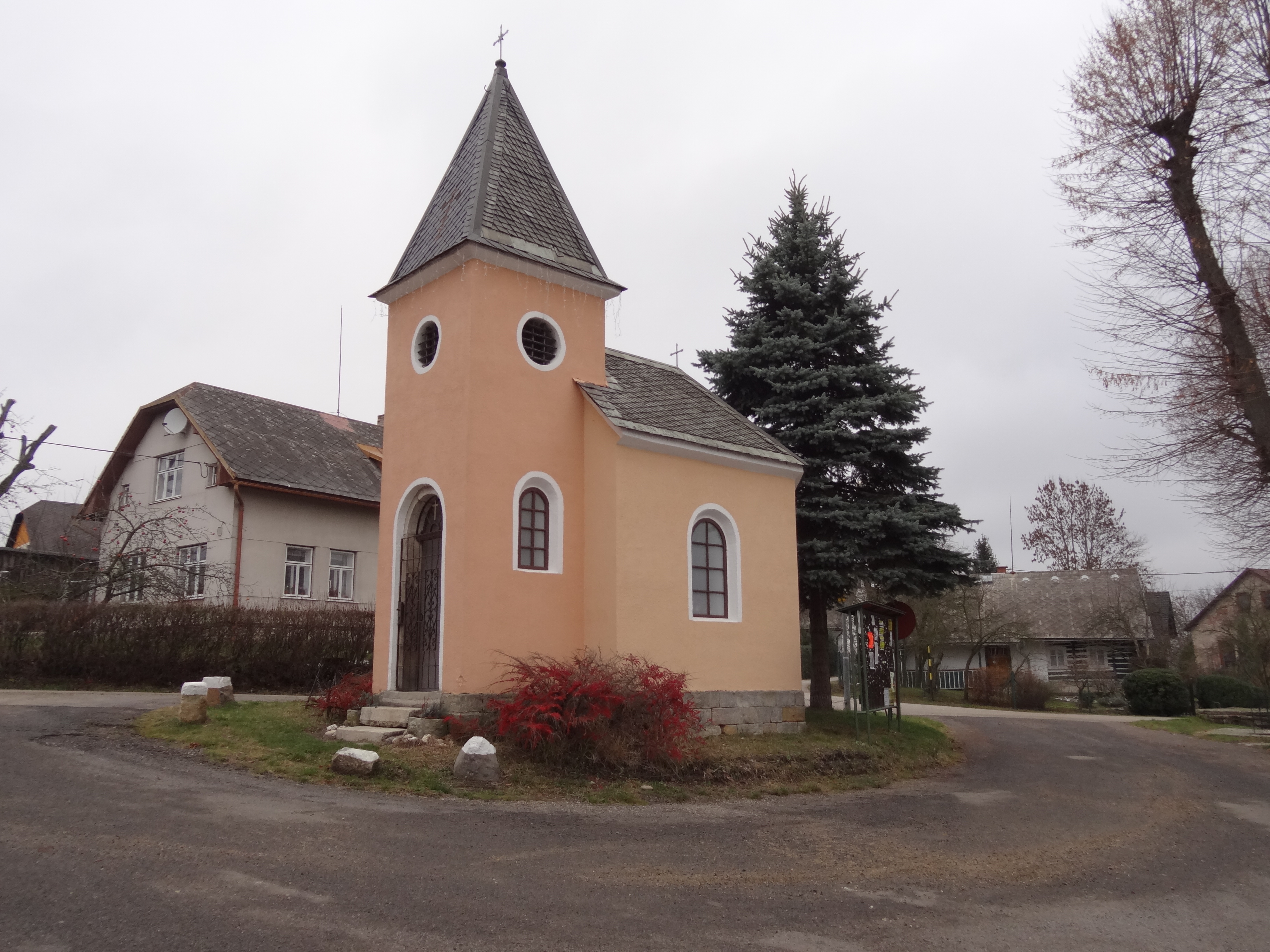 Dlouhý - náves s kaplí